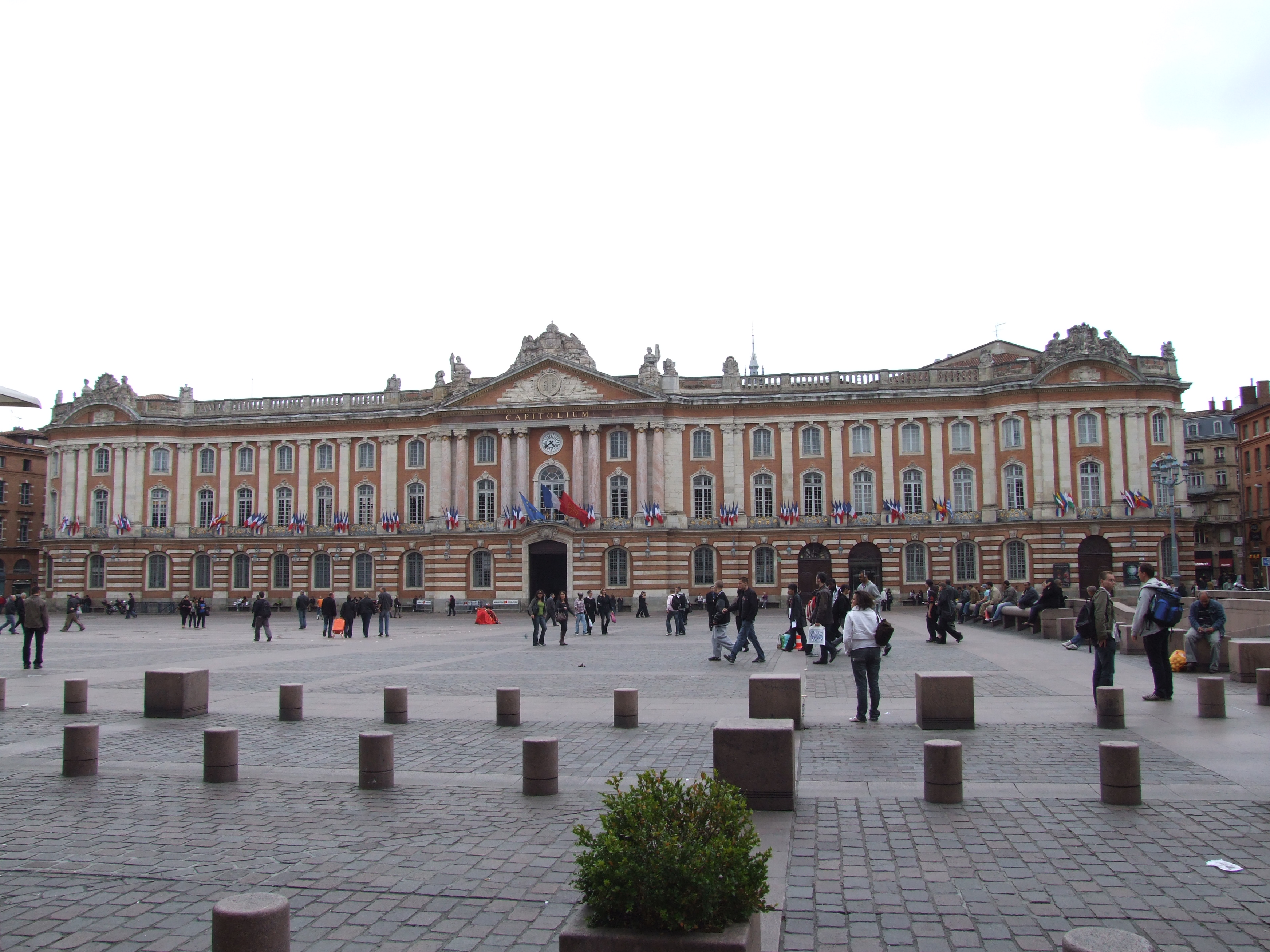 Toulouse - Rathaus